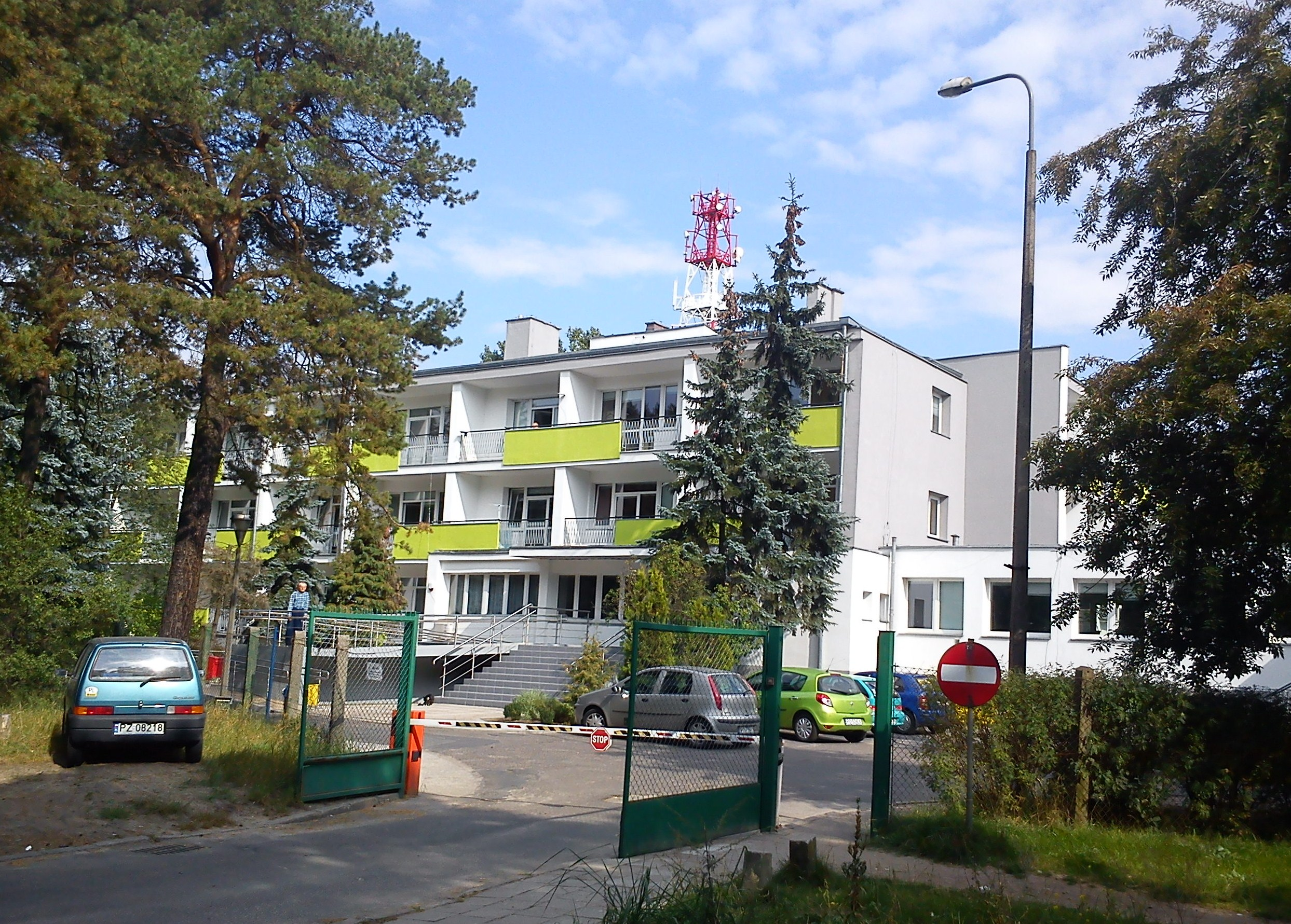 Dom Pomocy Społecznej - ul. Mogileńska (Poznań).